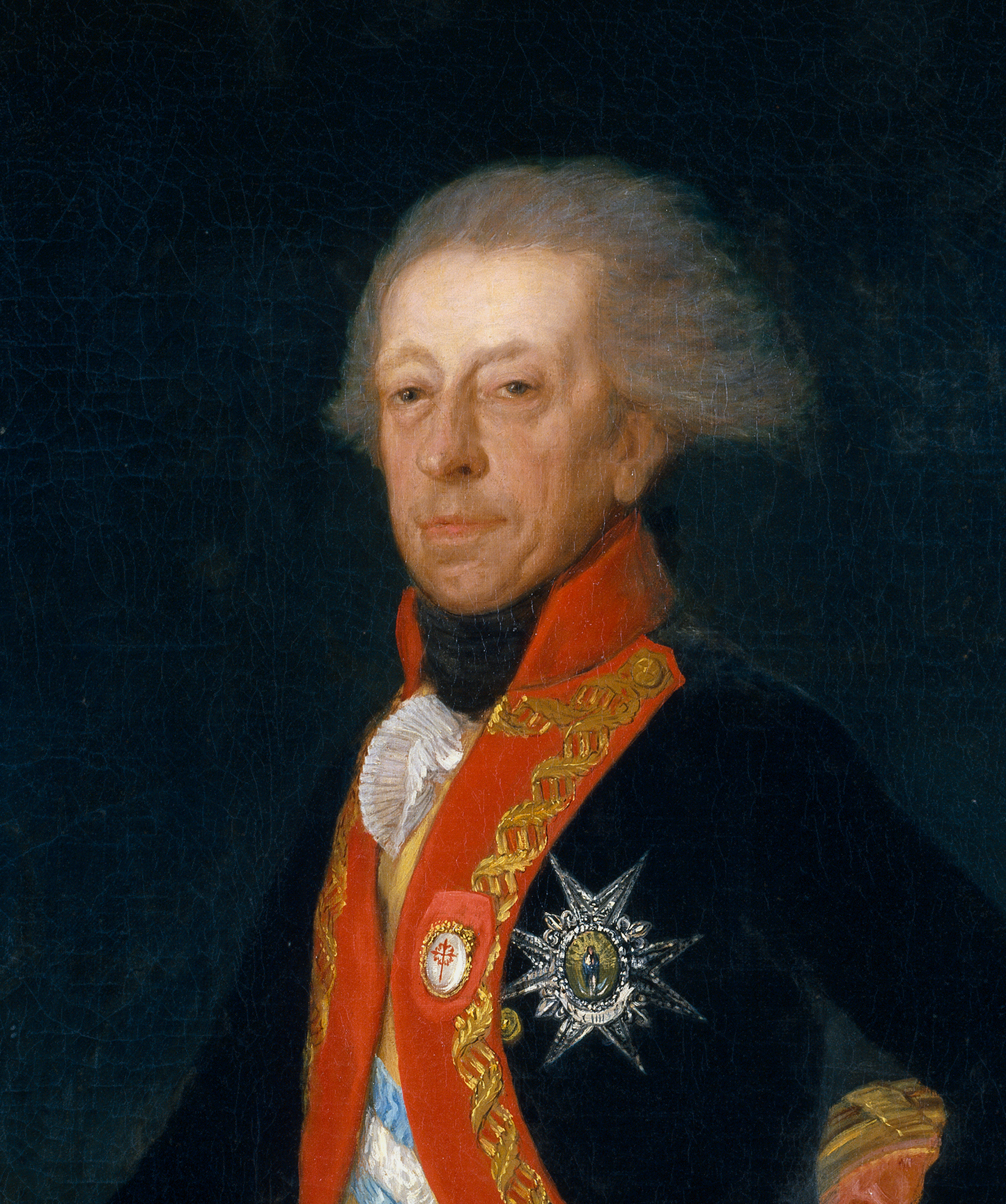 Détail du portrait du General Antonio Ricardos (1727-1794) publié sous licence libre sur Wikipédia.